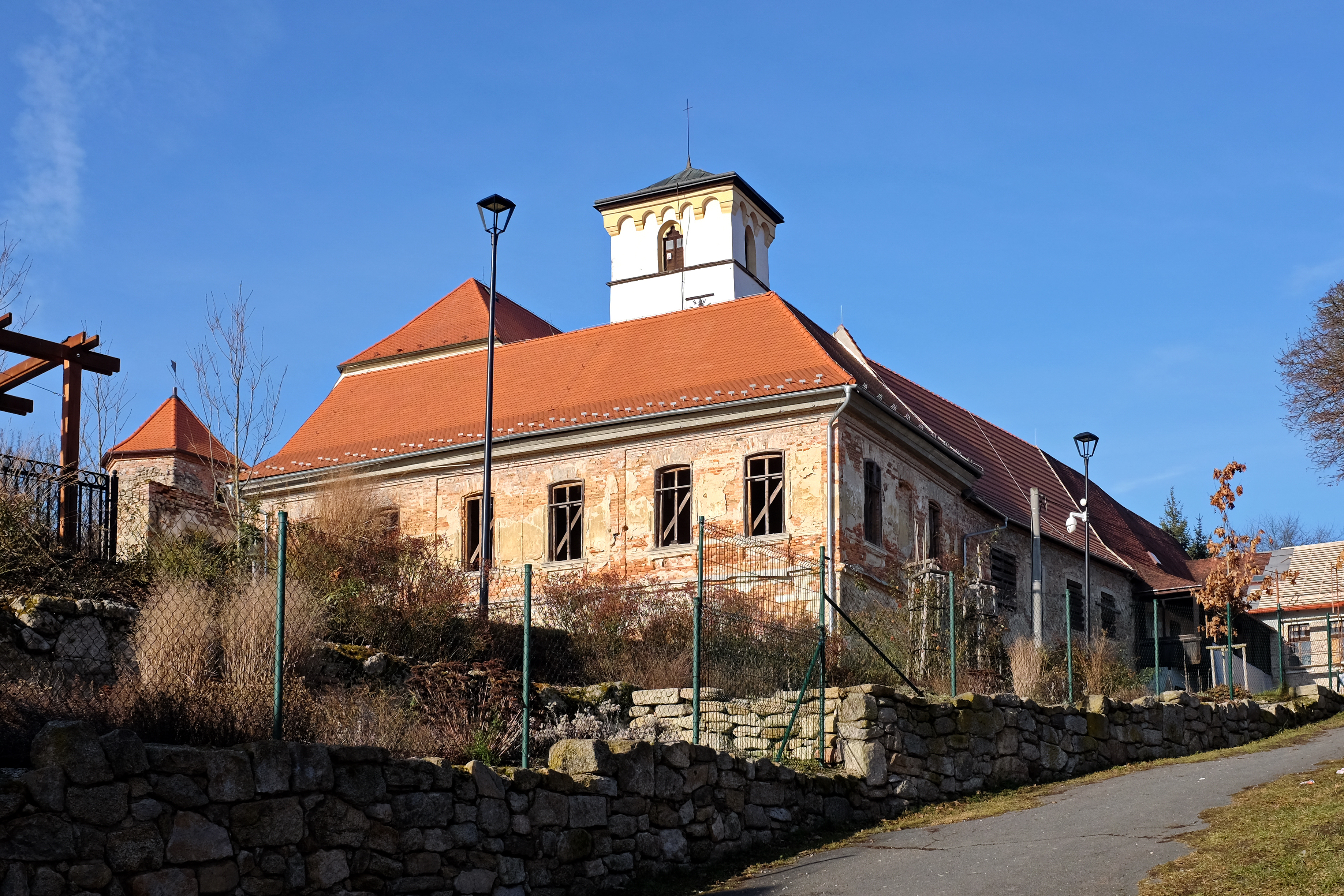 Zámek Hazlov, Hazlov 40, Hazlov.